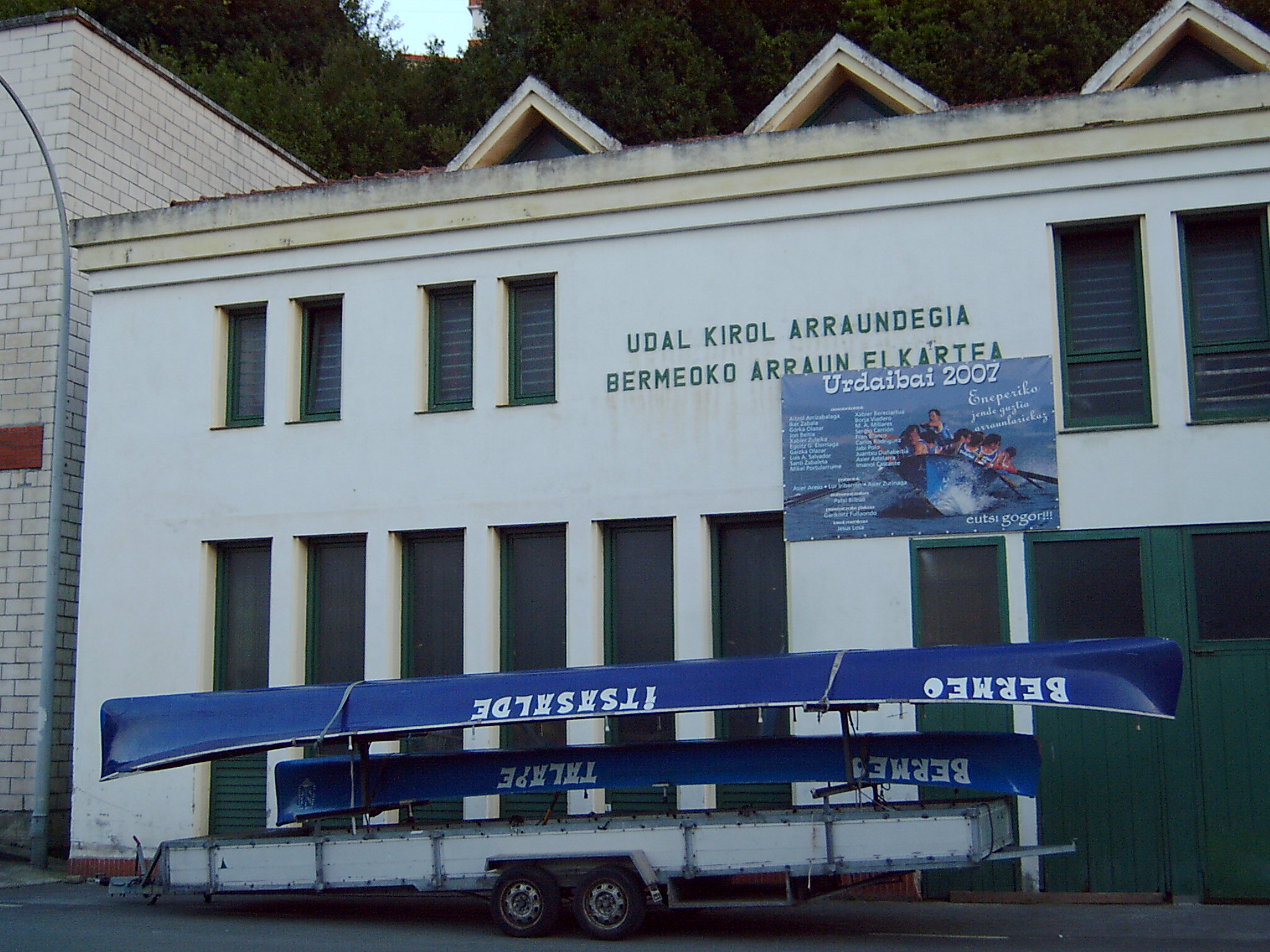 Bermeoko arraun taldearen udal egoitza